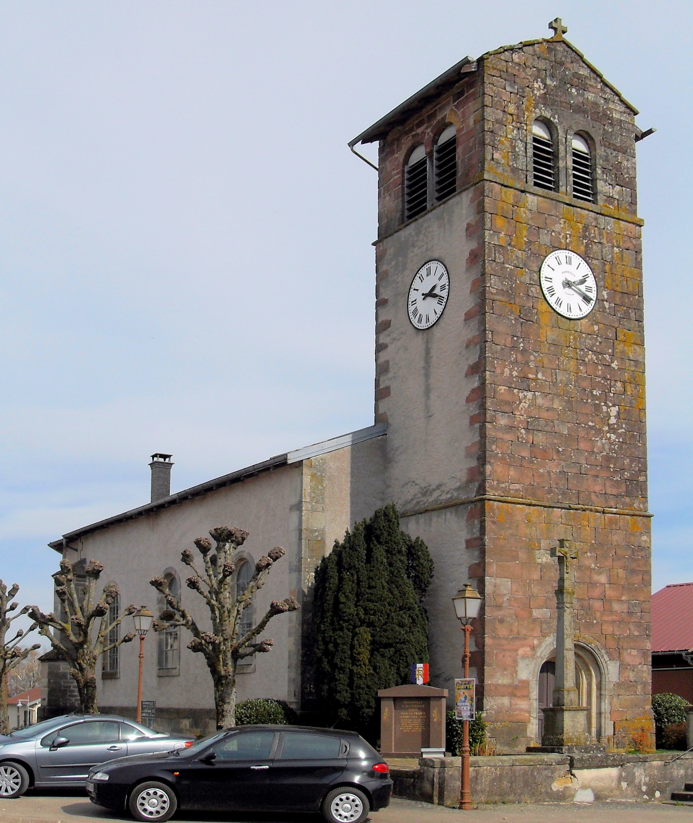 L'église Saint-Vincent à Dignonville